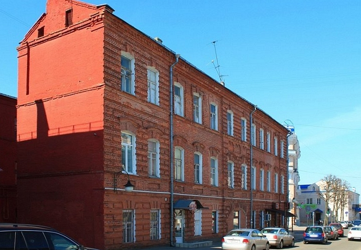 гасцініца «Метраполь». Магілёў